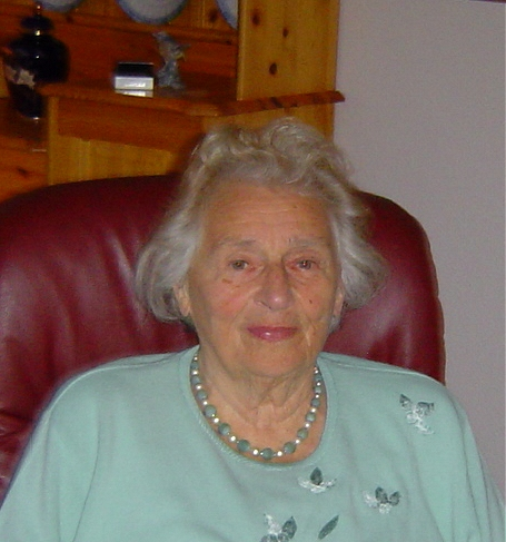 Elna Matland